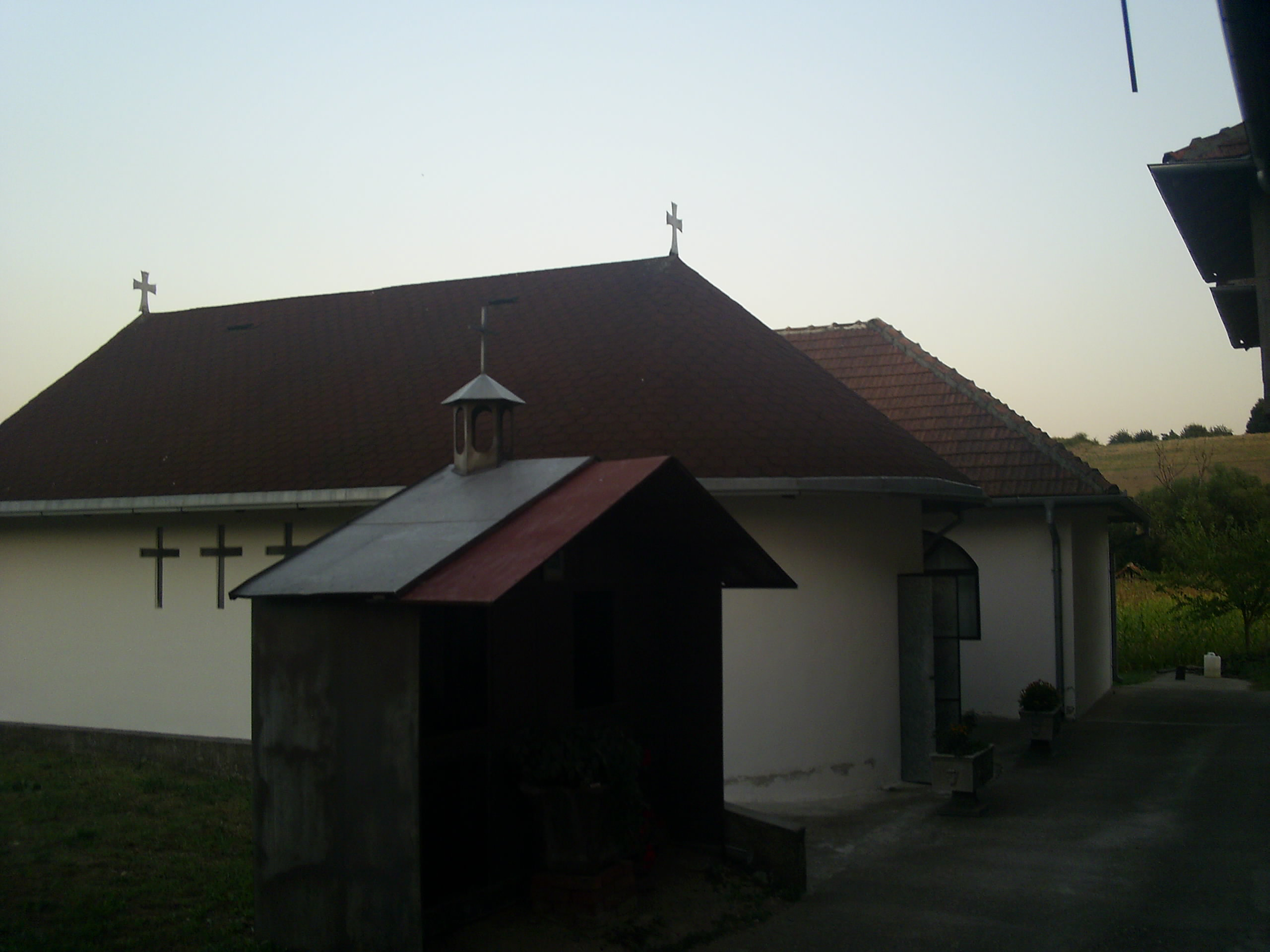 Манастир Вазнесења Господњег у Доброводици саграђен 2000. године.